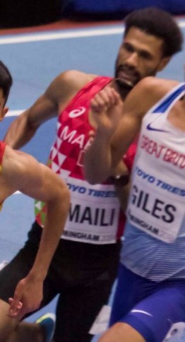 WK3B0139 800m finale man